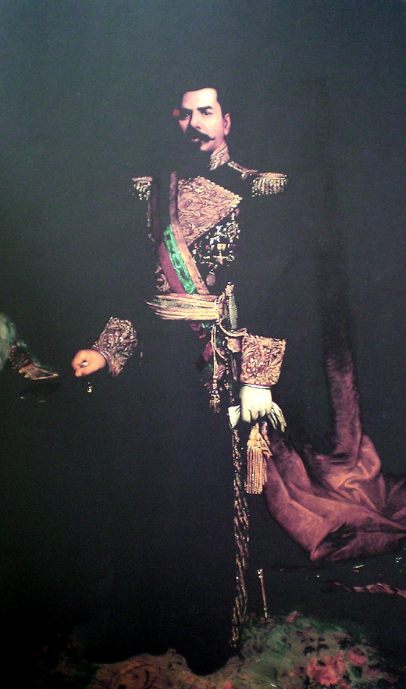 Portrait of Joaquín Crespo.